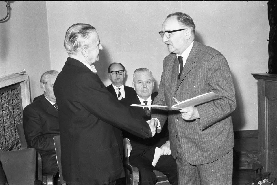 im Landeshaus. Im Bild der Bundessprecher der Pommerschen Landsmannschaft Oskar Eggert (vorn rechts) überreicht den Kulturpreis an den Komponisten Wilhelm Wapenhensch (vorn links).